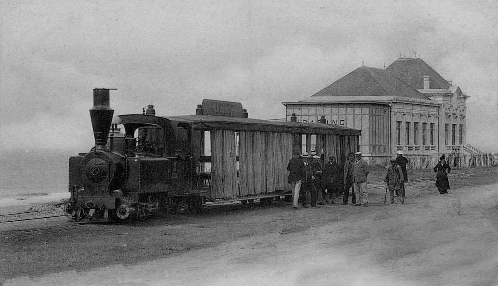 Tram à la Grande Côte - Tramway de Royan - 1904